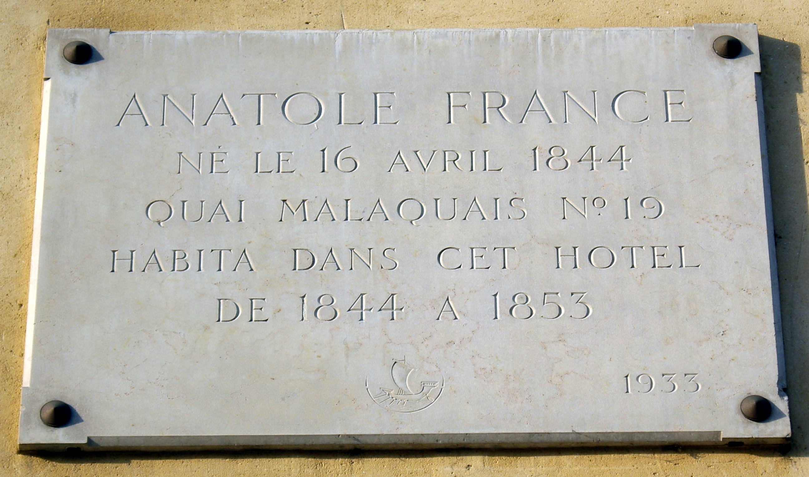 Plaque apposée au n° 15 du quai Malaquais, Paris 6e, où grandit de 1844 à 1853 l'écrivain Anatole France (1844-1924), né le 16 avril 1844 au n° 19.